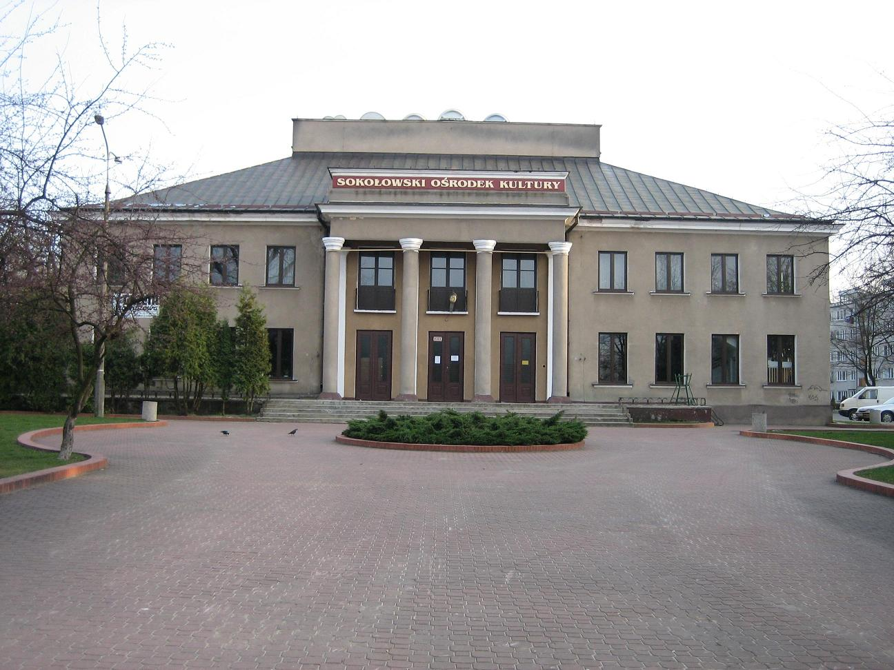 Sokołów Podlaski